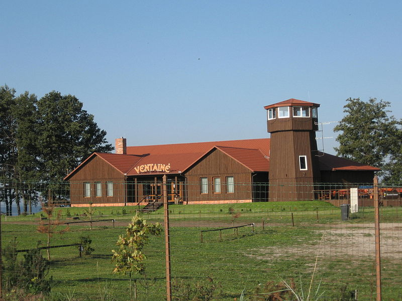 Poilsio namai Ventainė Ventėje